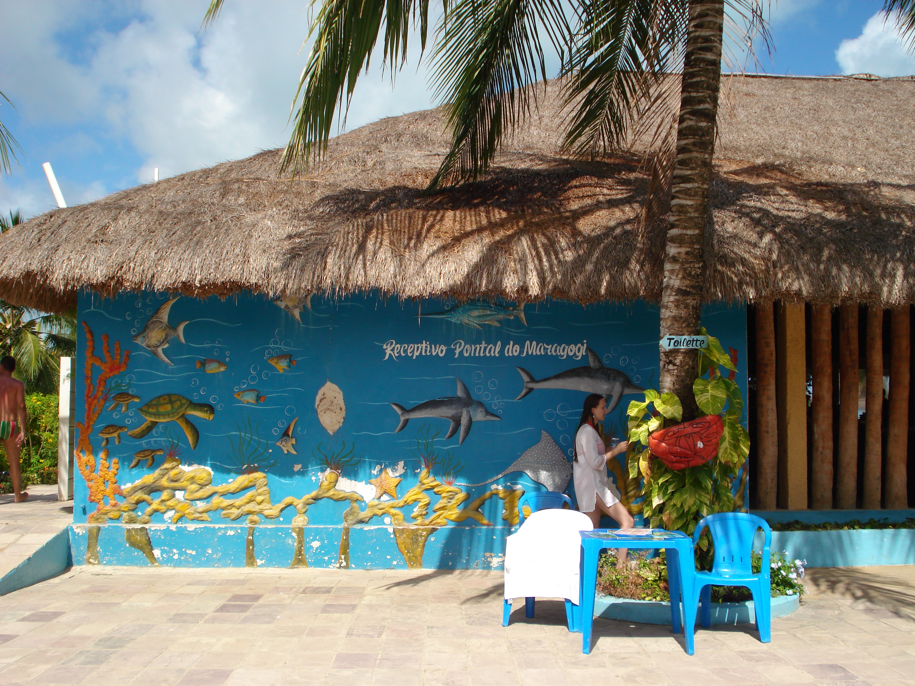 Ponto de apoio a turistas para acesso às piscinas naturais na praia de Maragogi, Maceio-AL